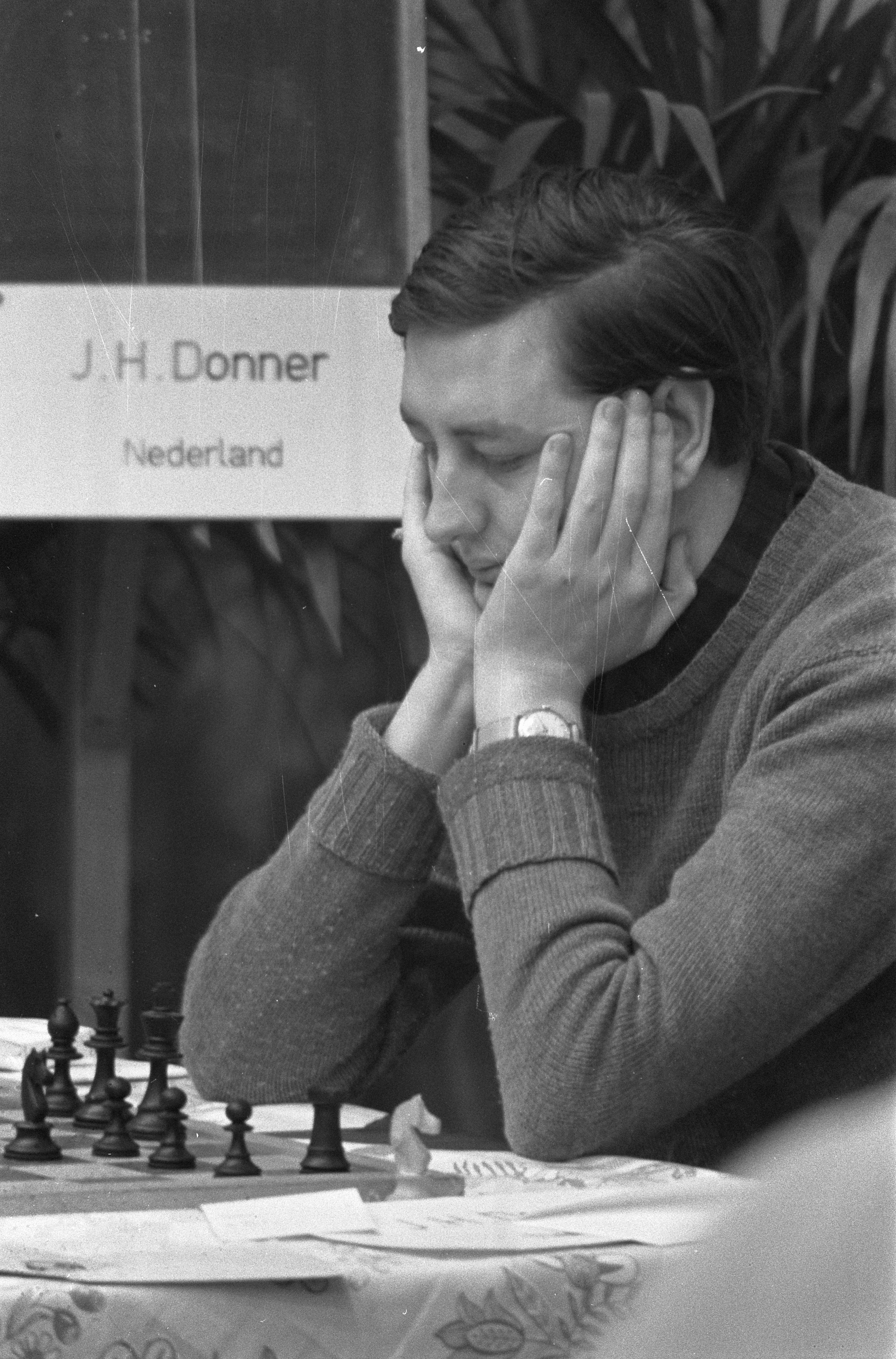 Collectie / Archief : Fotocollectie Anefo Reportage / Serie : [ onbekend ] Beschrijving : Hoogovenschaaktoernooi te Beverwijk, Jan Hein Donner in actie Datum : 12 januari 1960 Locatie : Beverwijk Trefwoorden : schaken, sport Persoonsnaam : Donner, Jan Hein Instellingsnaam : Hoogovenschaaktournooi Fotograaf : Pot, Harry / Anefo Auteursrechthebbende : Nationaal Archief Materiaalsoort : Negatief (zwart/wit) Nummer archiefinventaris : bekijk toegang 2.24.01.05 Bestanddeelnummer : 910-9355